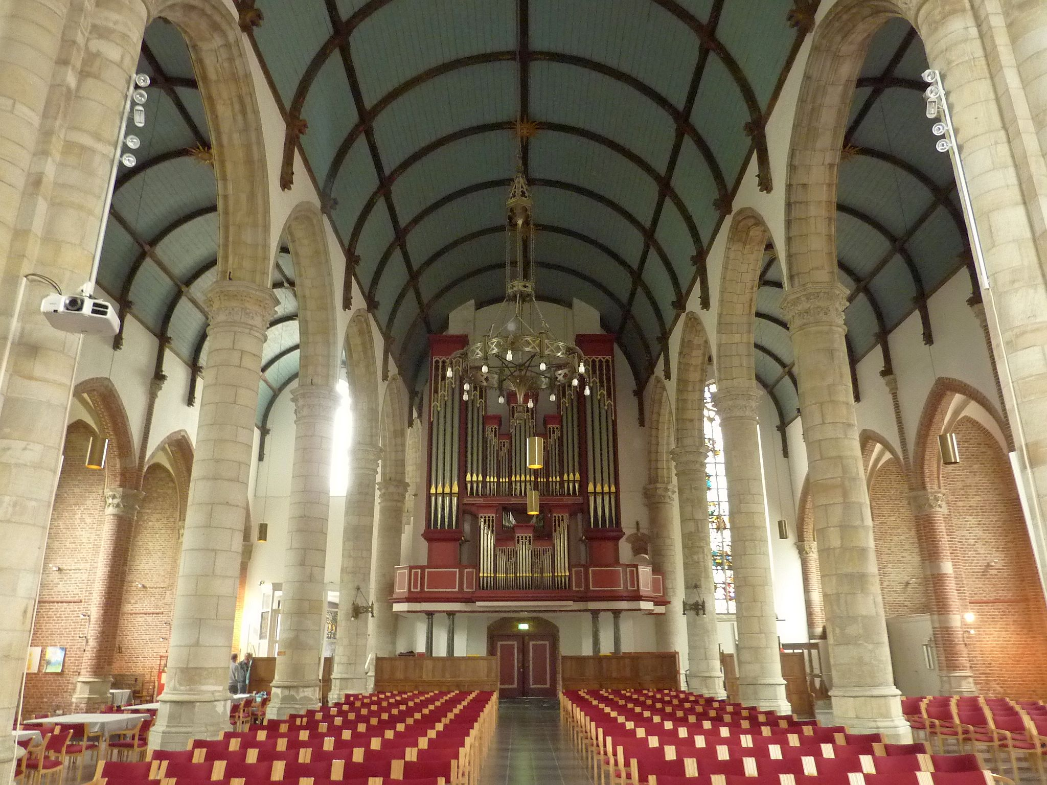 Sint Jacob (Vlissingen)